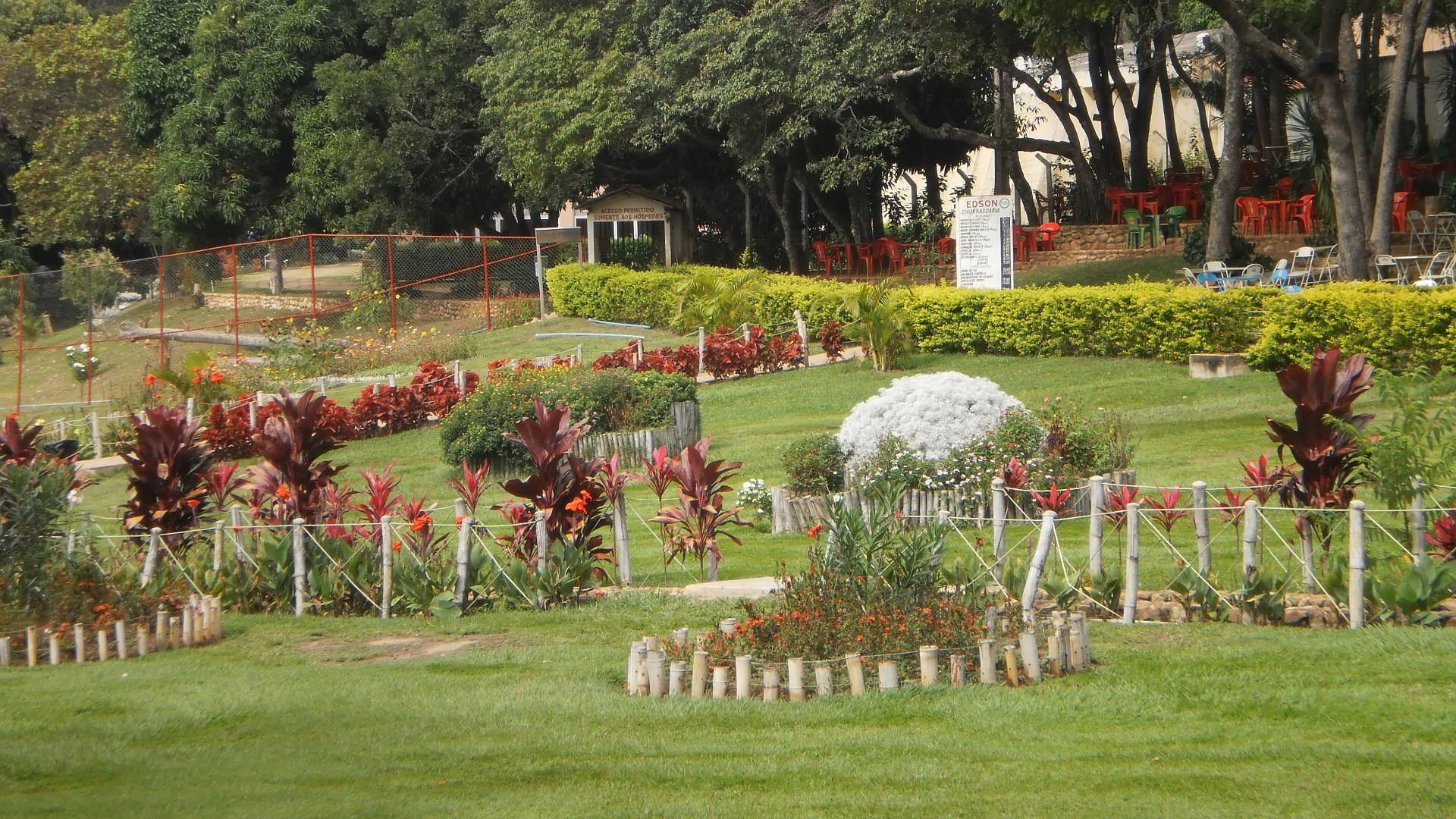 Área para lazer Balneário do Caldas - Barbalha - Ce.